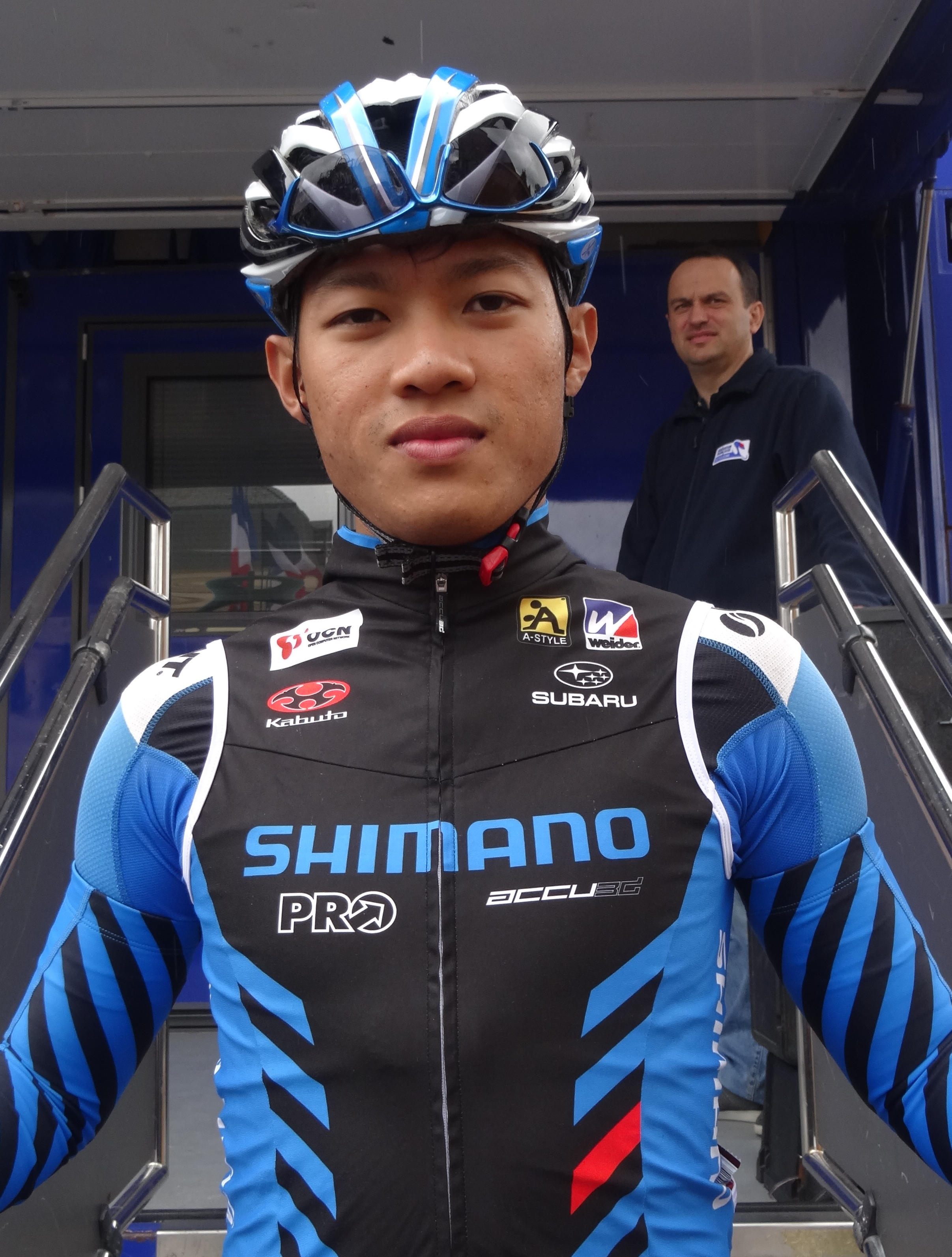 Reportage photographique réalisé le dimanche 13 juillet à l'occasion du départ et de l'arrivée de la Ronde pévéloise 2014 à Pont-à-Marcq, Nord-Pas-de-Calais, France.